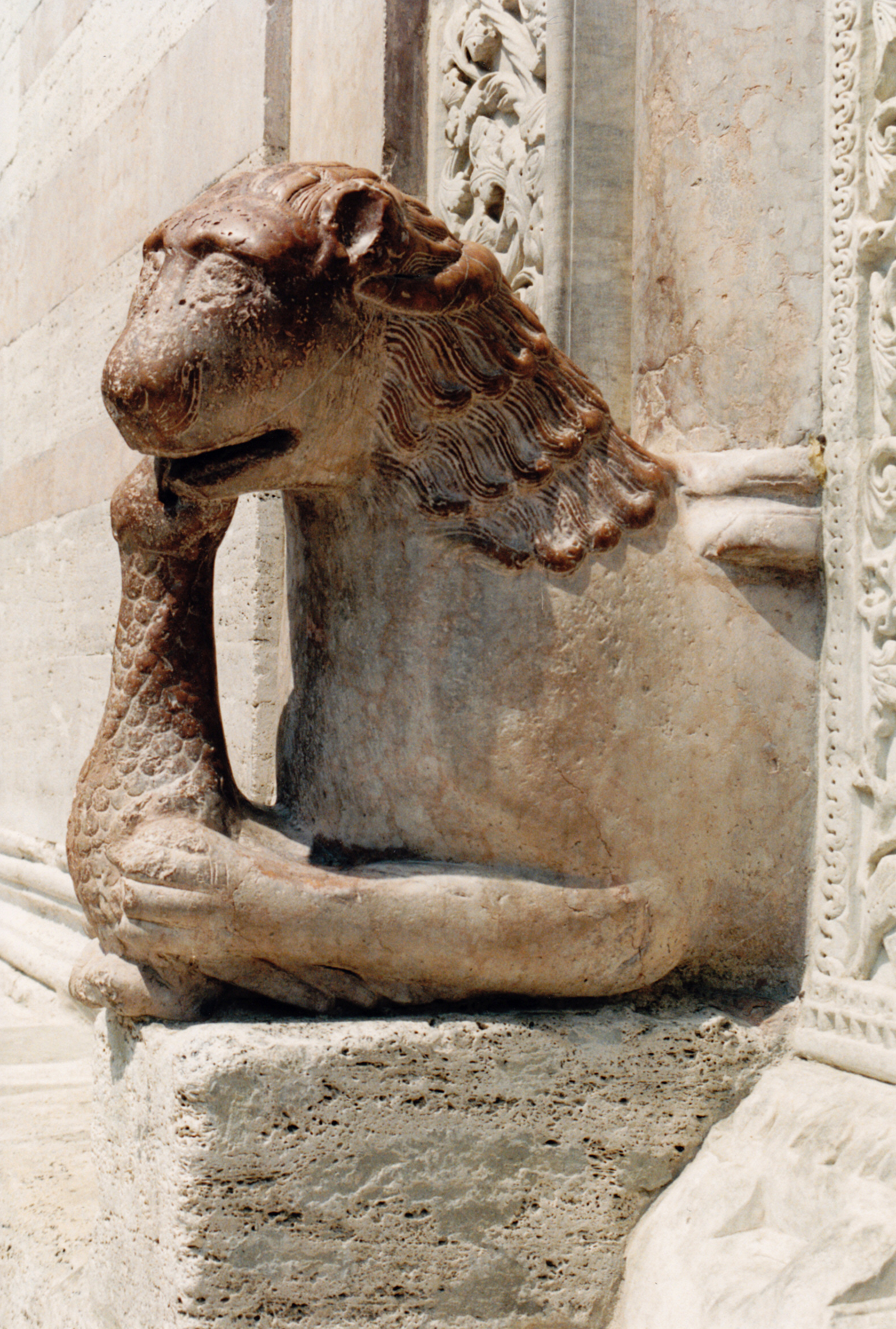 Italie - Ombrie - Cathédrale de Foligno